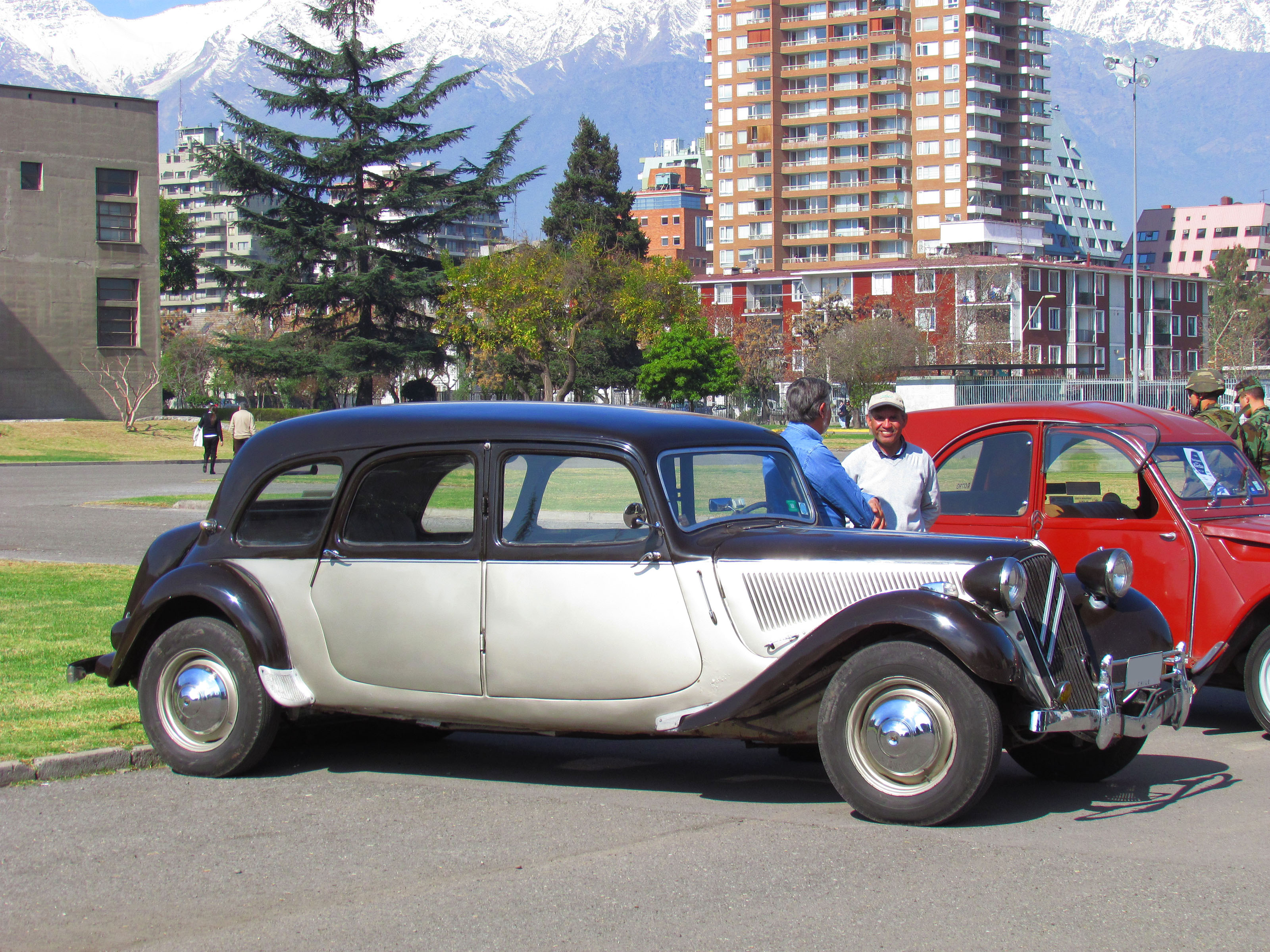 Citroen 11 CV Familiale 1955